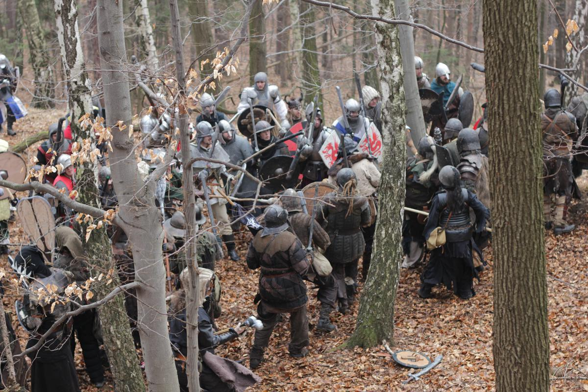 Krvavá Zima 2011